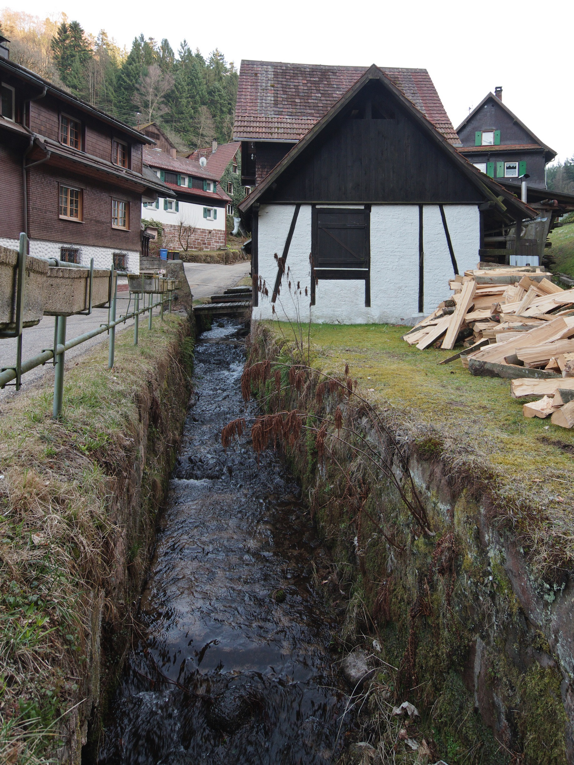 Der Rubach in dem zu Baden-Baden-Lichtental gehörenden Ort Schmalbach